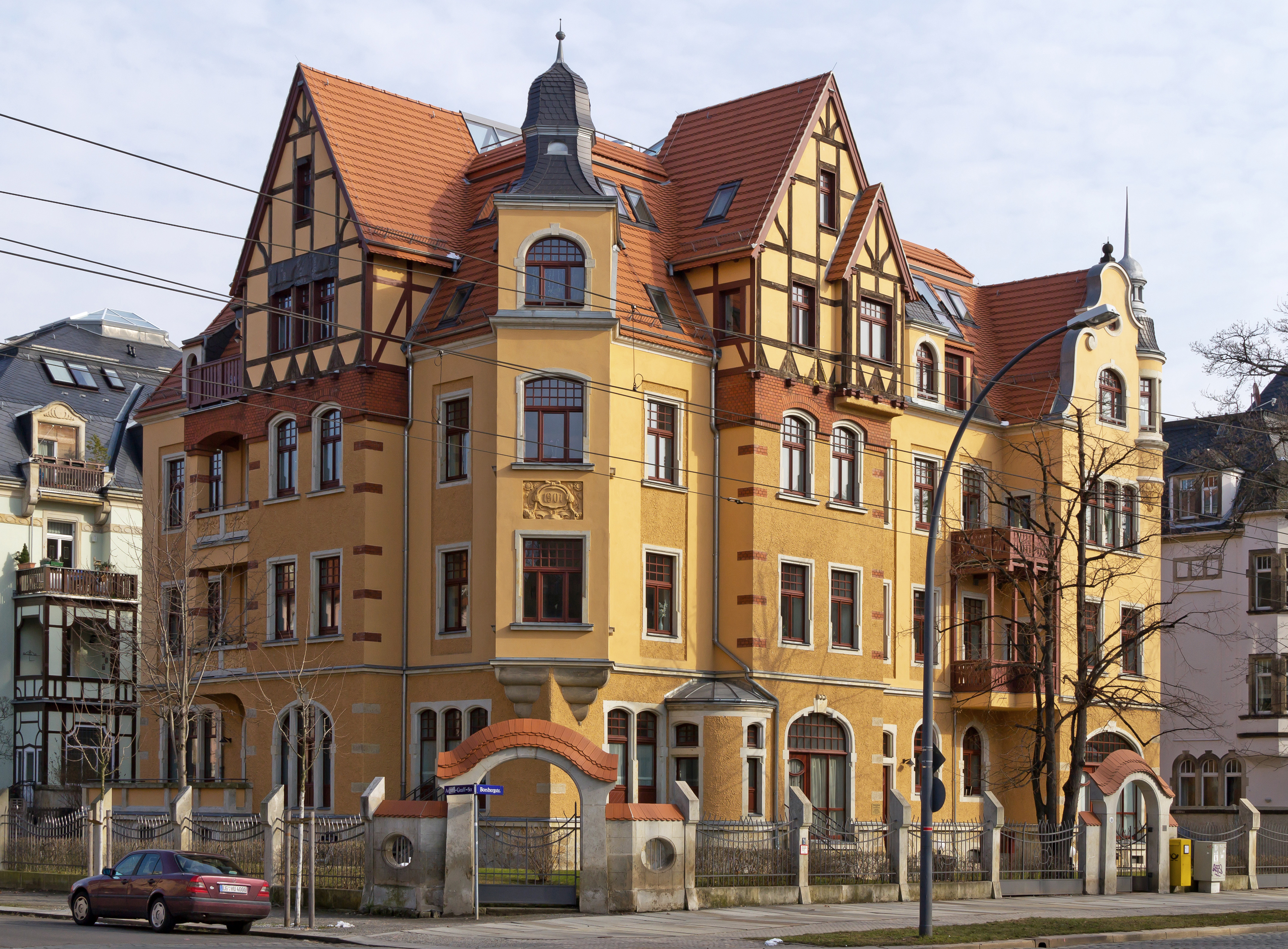 Mietshaus Borsbergstraße 11 in Dresden